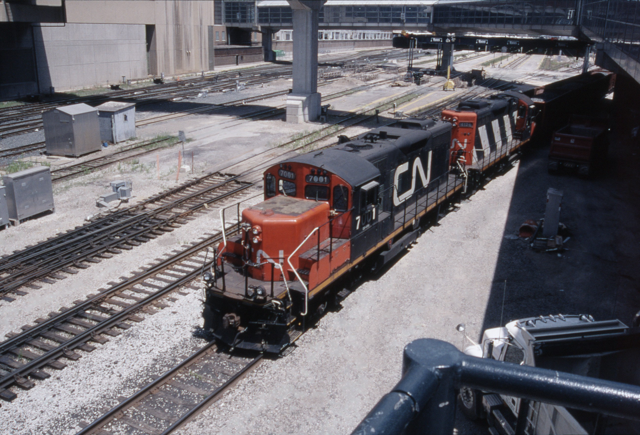 EMD GP9U der Canadian National Railway mit einem Güterzug im Bahnhof Toronto